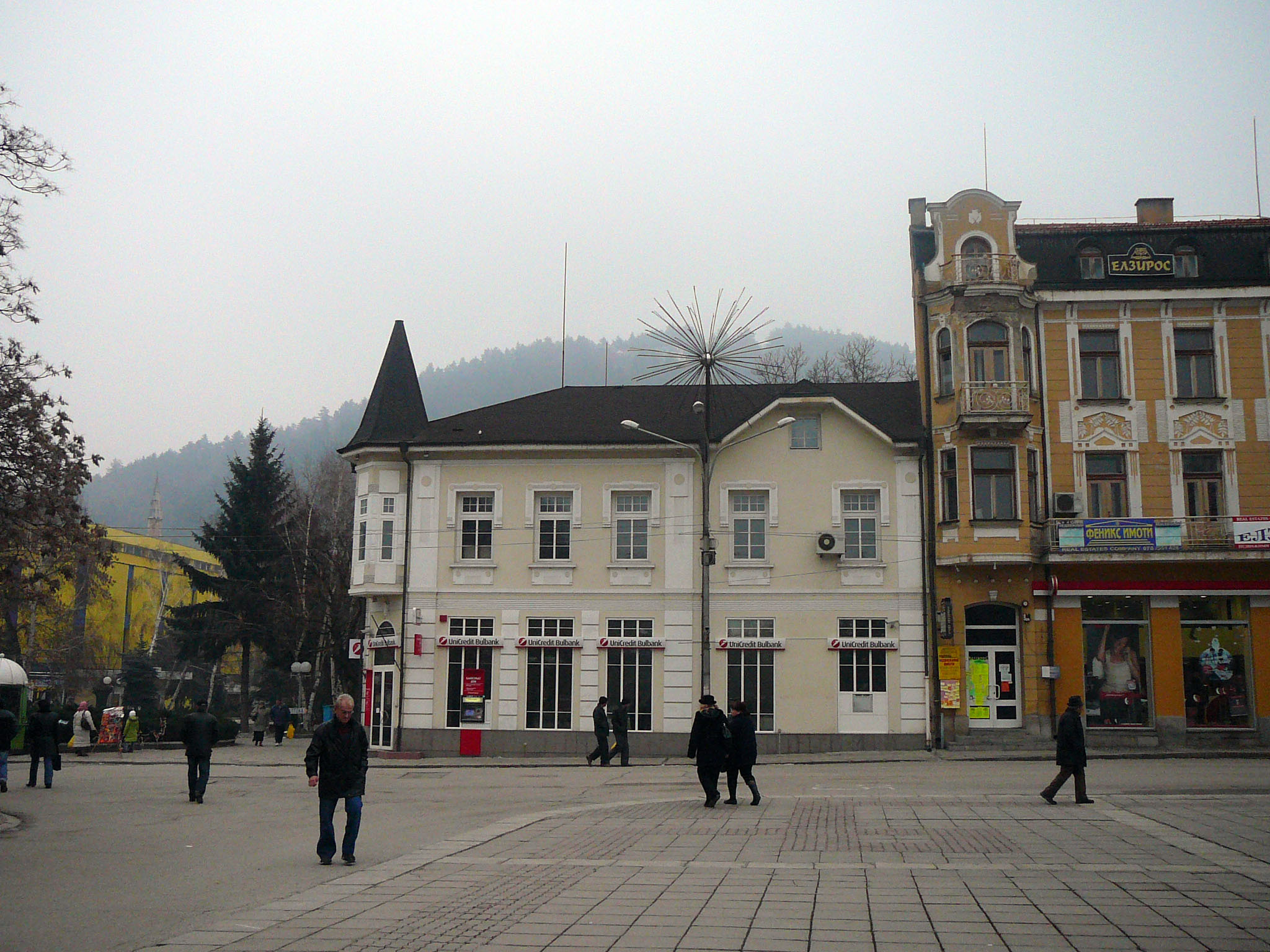 Kyustendil,Bulgaria